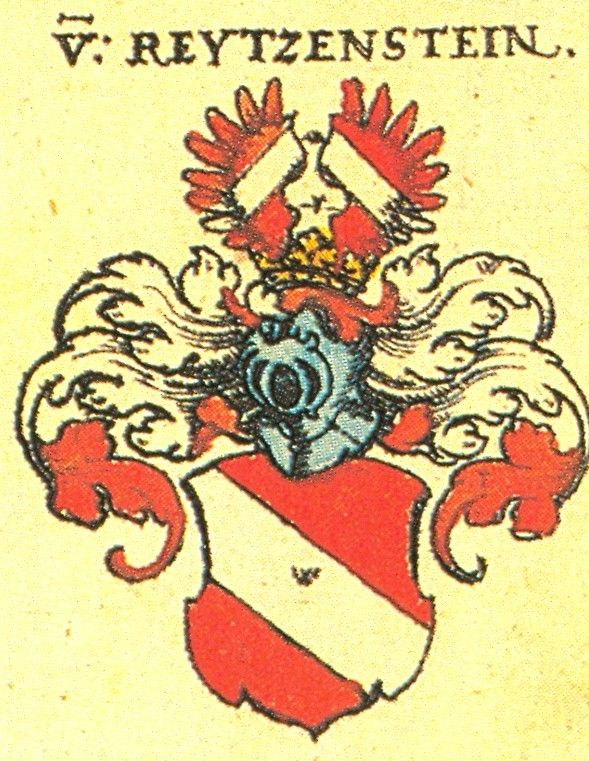 Wappen der Fränkischen Adelsfamilie Reitzenstein